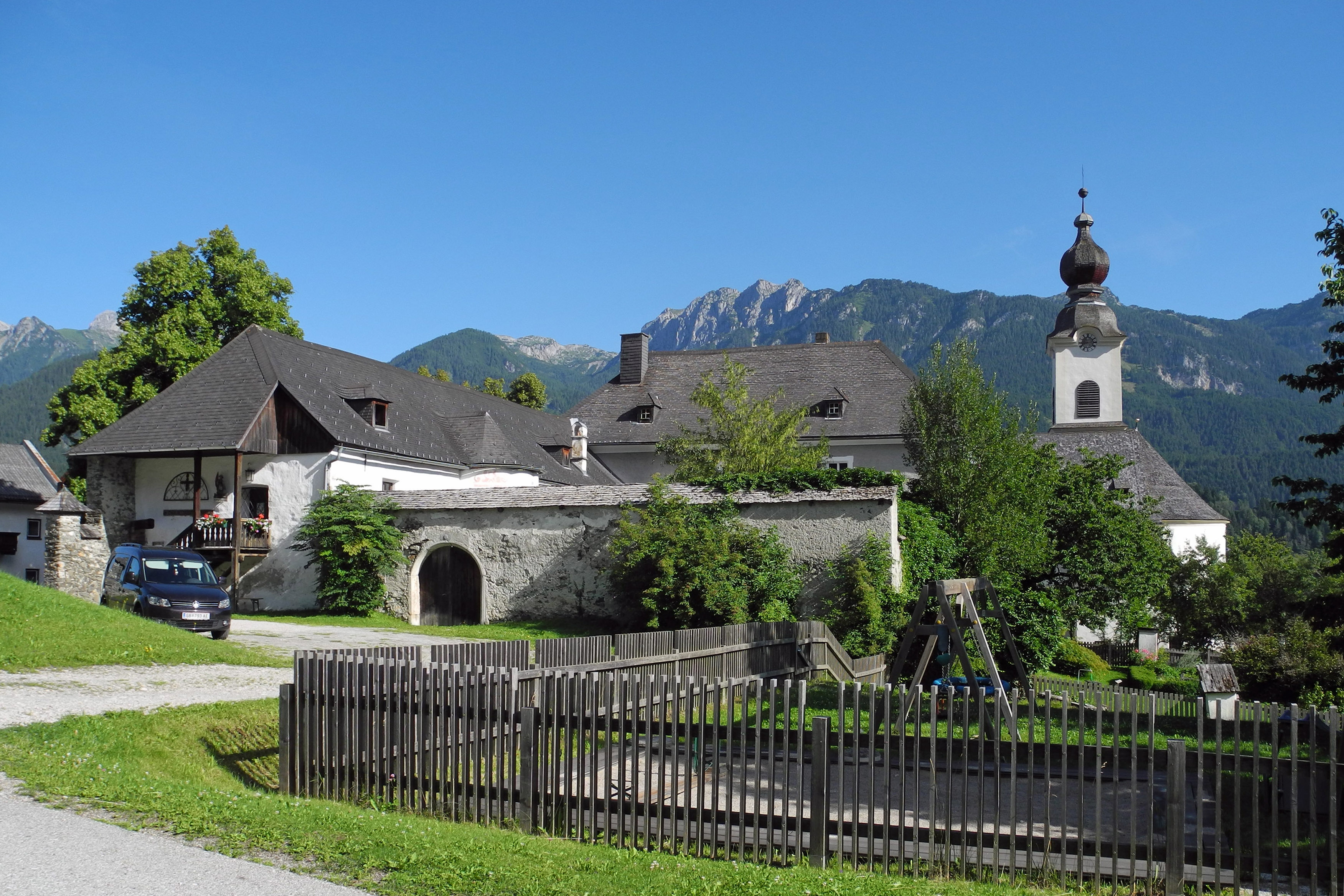 Dekanatsmuseum mit Zehentspeicher und Pfarrkirche des hl. Johannes des Täufers in Haus im Ennstal